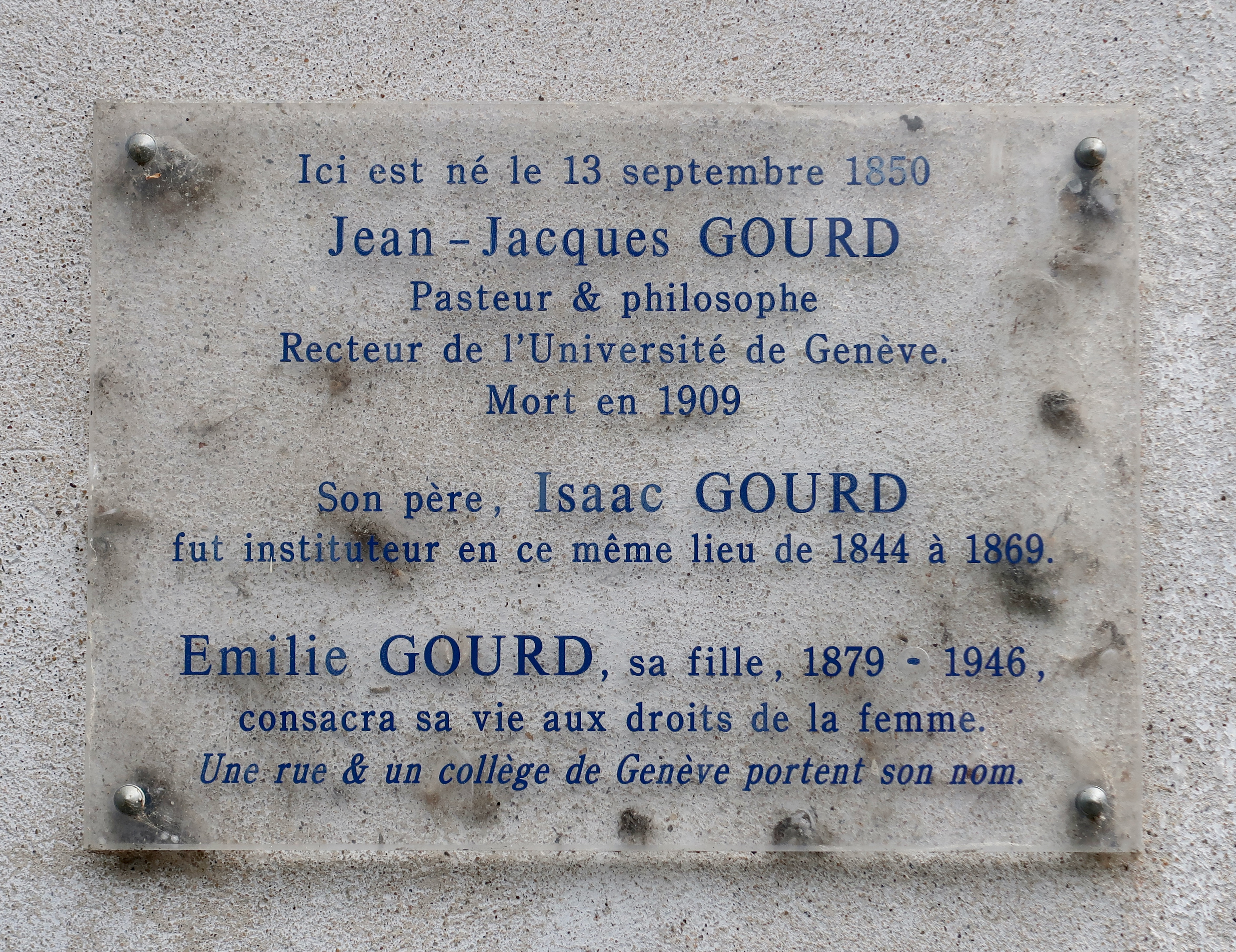 Plaque rue de la Passagère à Le Fleix (Dordogne), en hommage au pasteur et philosophe Jean-Jacques Gourd qui y est né, ainsi qu'à son père Isaac Gourd (qui y fut instituteur) et à sa fille Émilie Gourd (féministe genevoise).